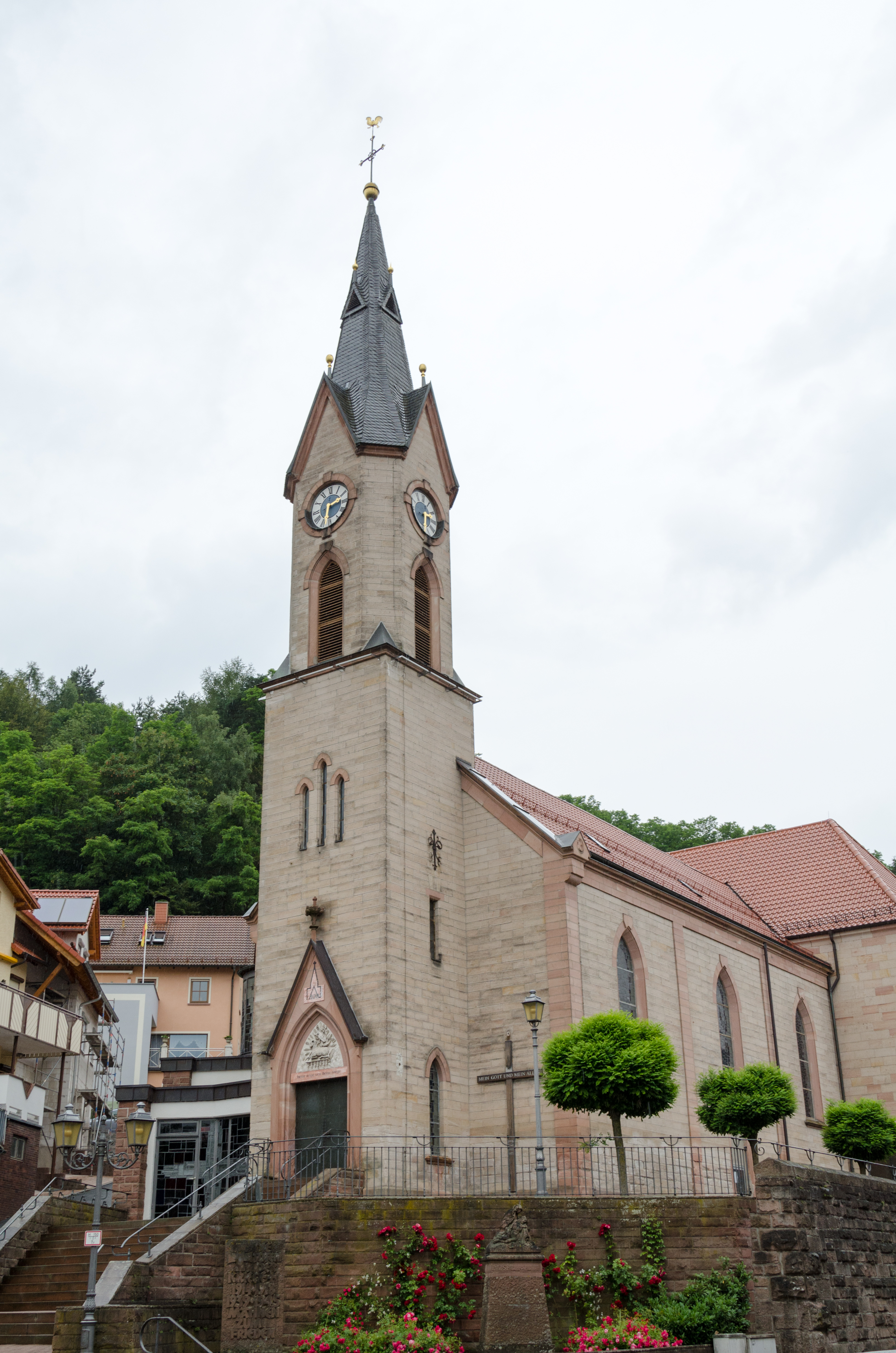 Heigenbrücken, Katholische Pfarrkirche St Wendelin